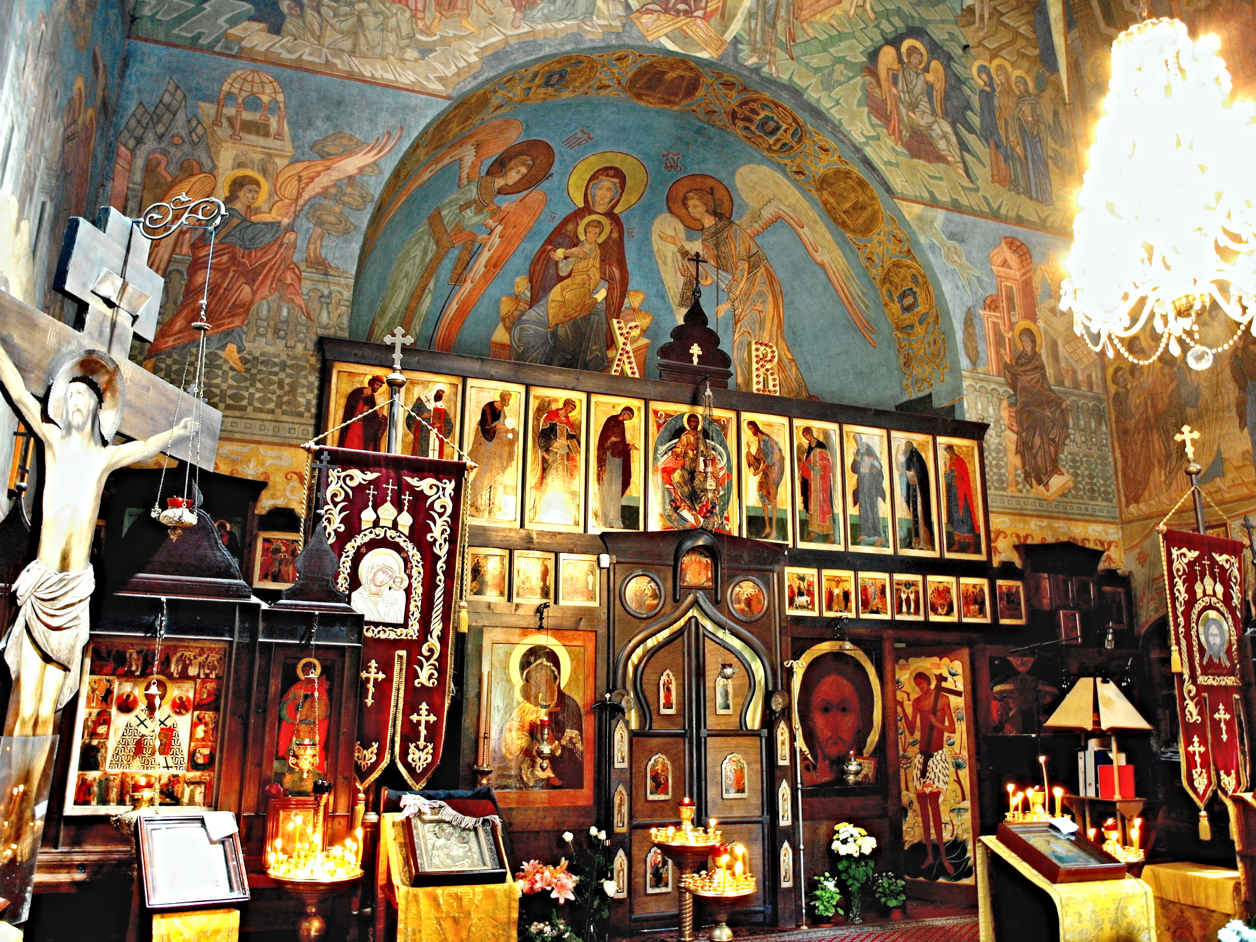 Interiér Uspenského chrámu v Praze